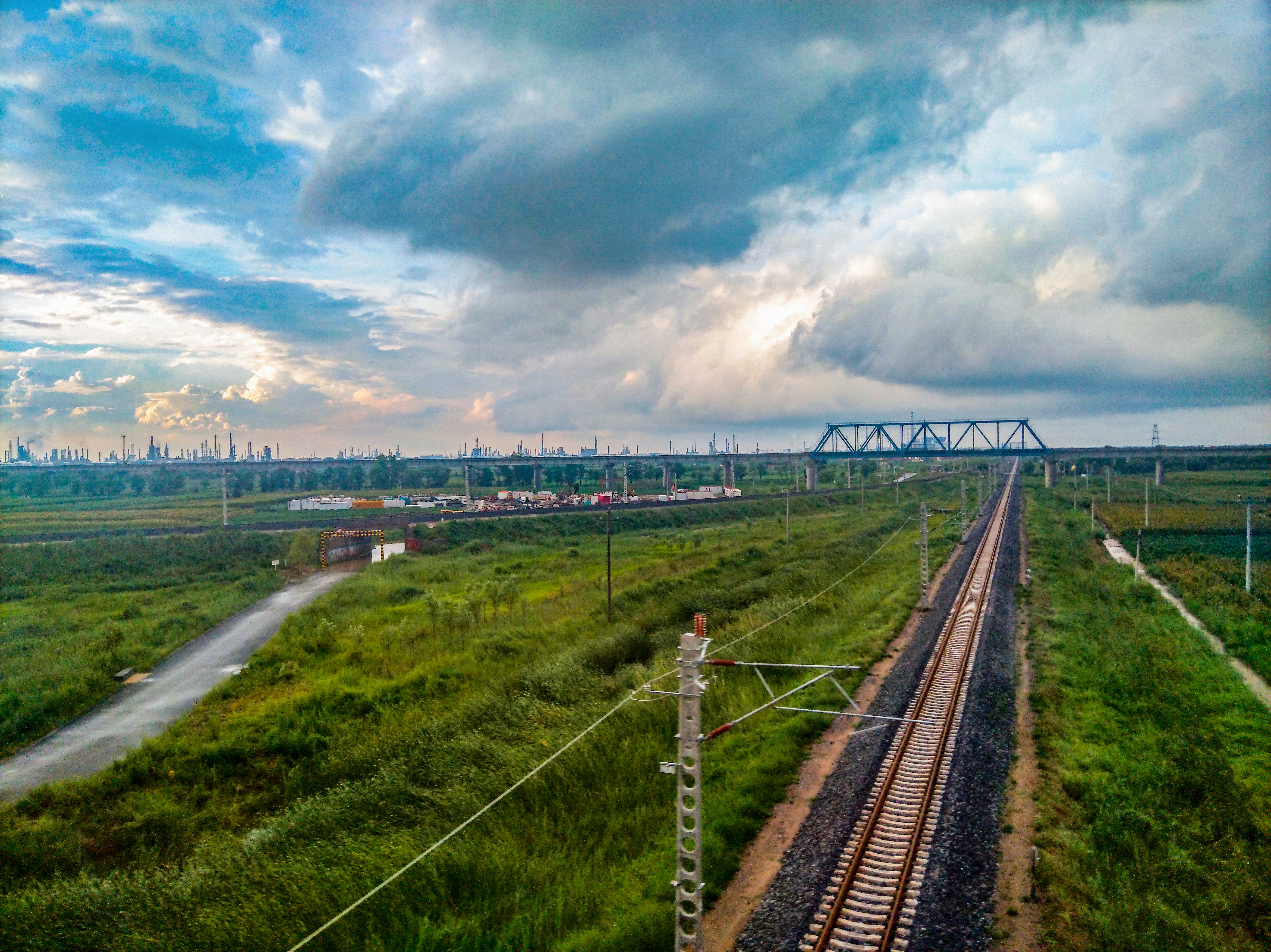 黄大铁路上跨史口联络线（左）与淄东铁路（右）